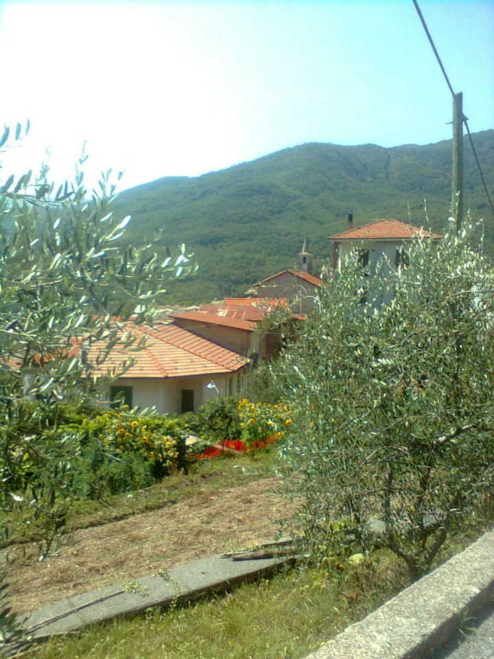 Scorcio della Frazione Moano